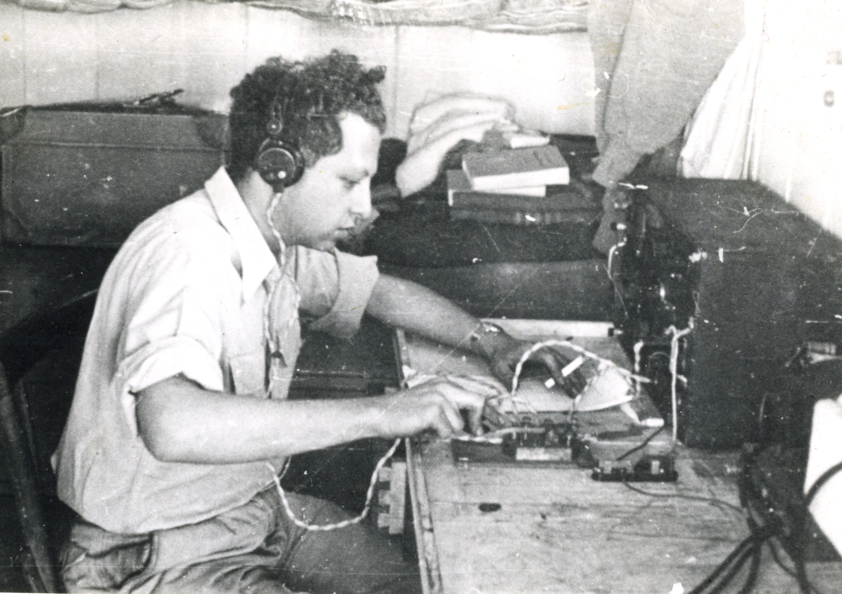 צבי כרמל- גדעוני על אוניות רכש